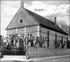 Postkarte mit Synagoge in Bischwiller